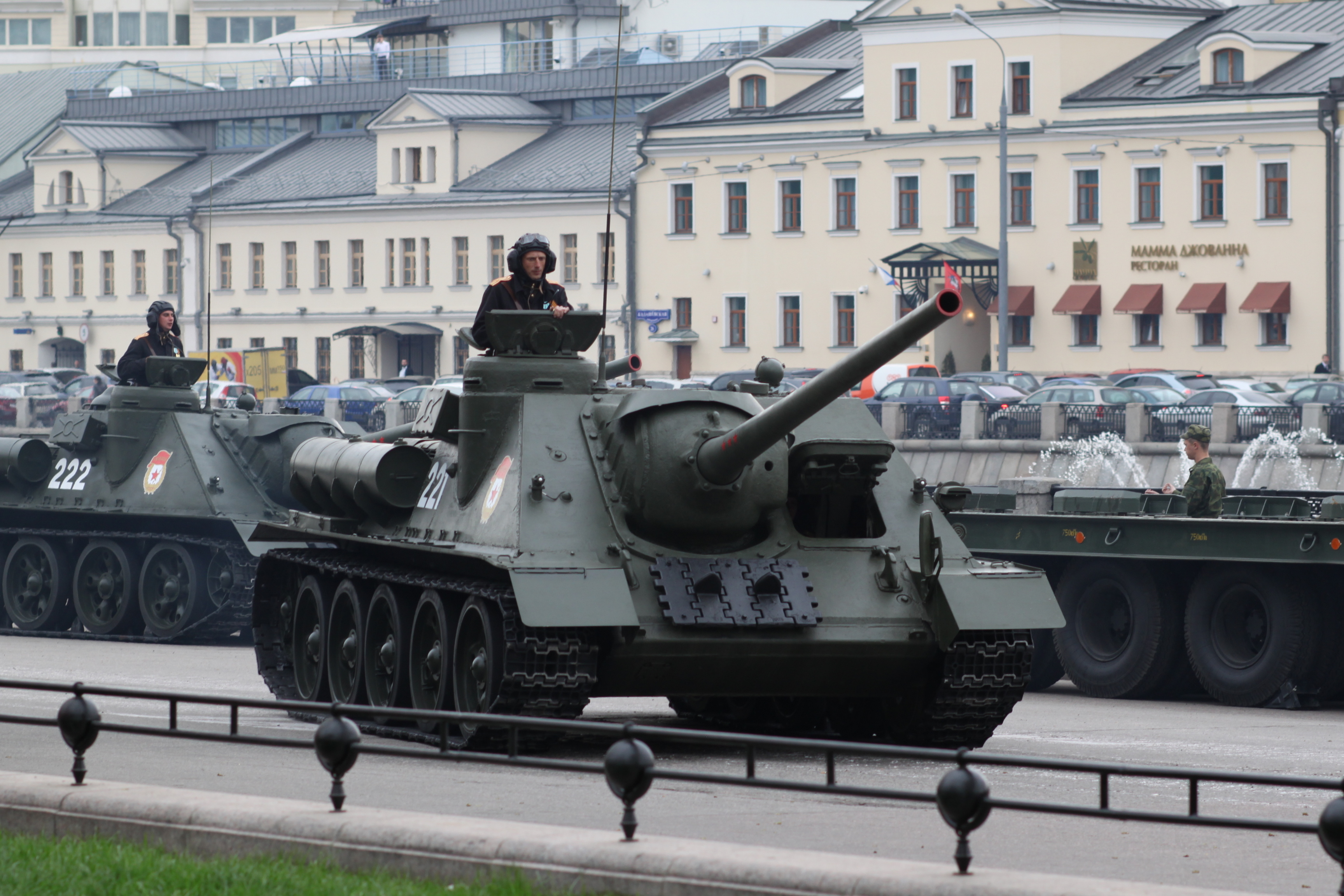 Репетиция парада Победы 6 мая 2010 года. Самоходно-артиллерийская установка СУ-100.